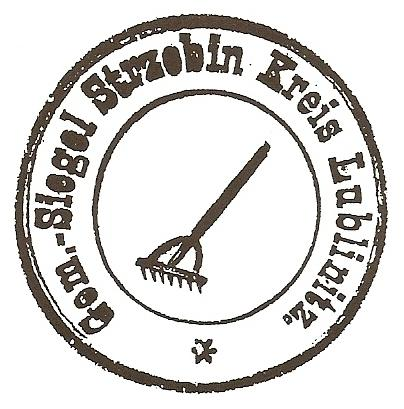 Pieczęć herbu Strzebinia z grabiami ułożonymi skośnie (w latach 1841-1889)